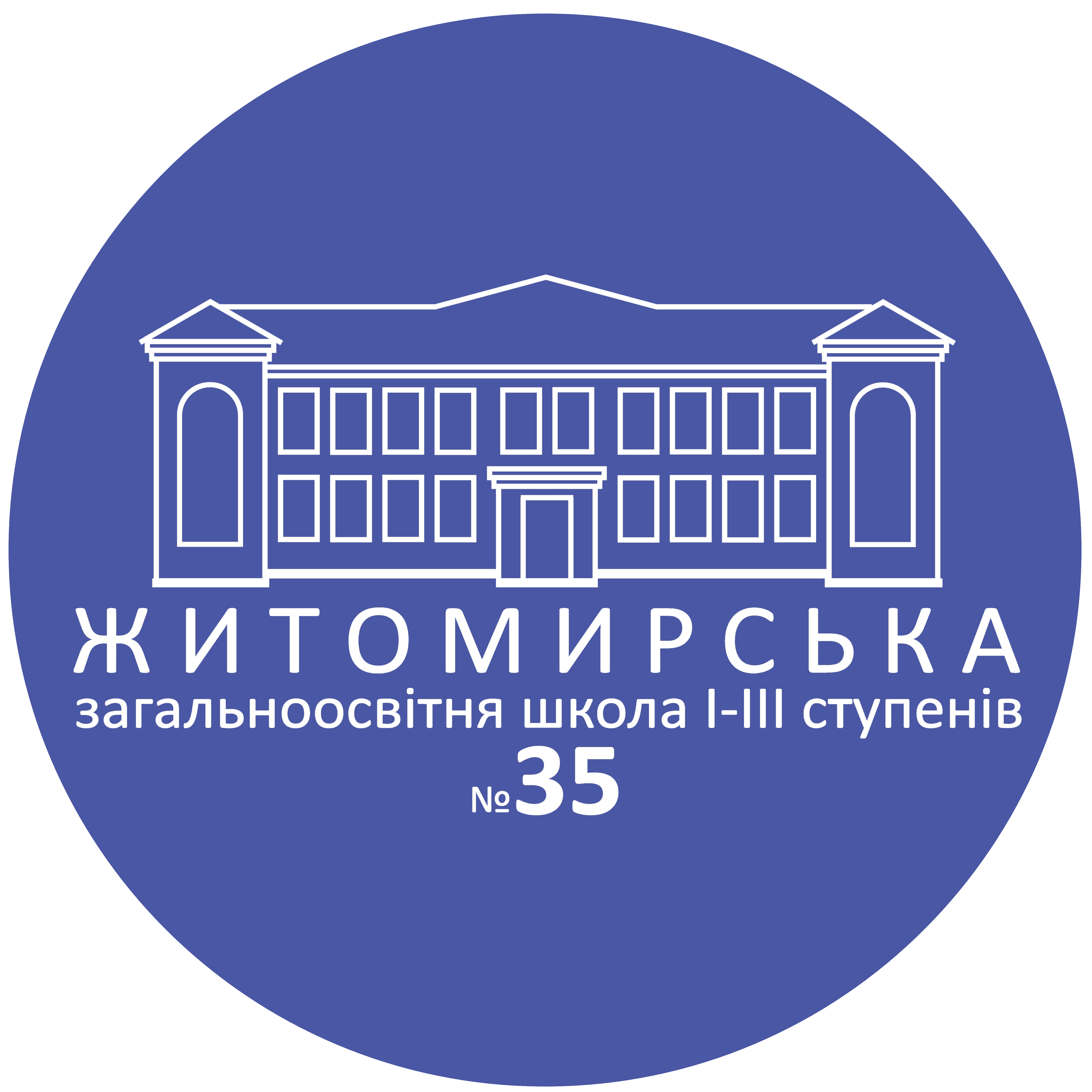 Містить логотип закладу освіти в Україні